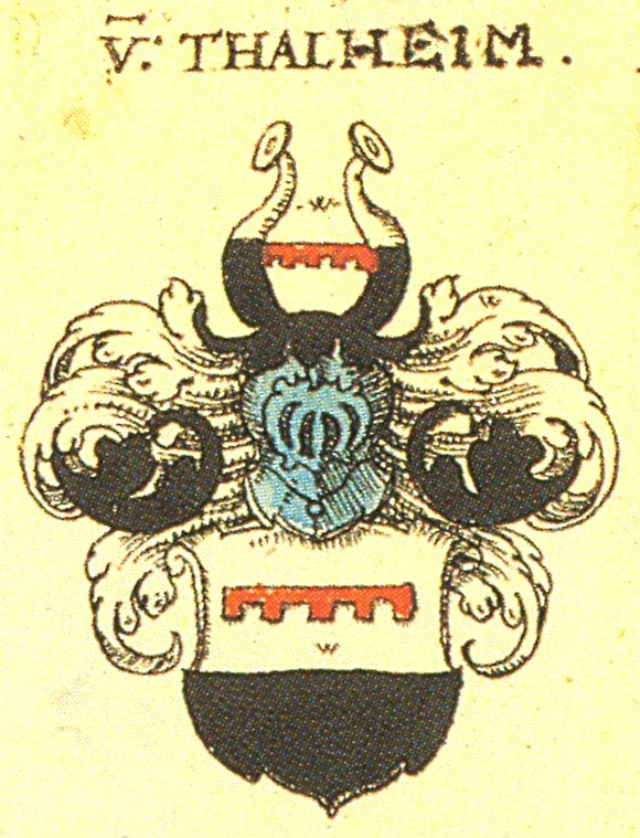 Ritterschaft und Adel in Schwaben von Thalheim